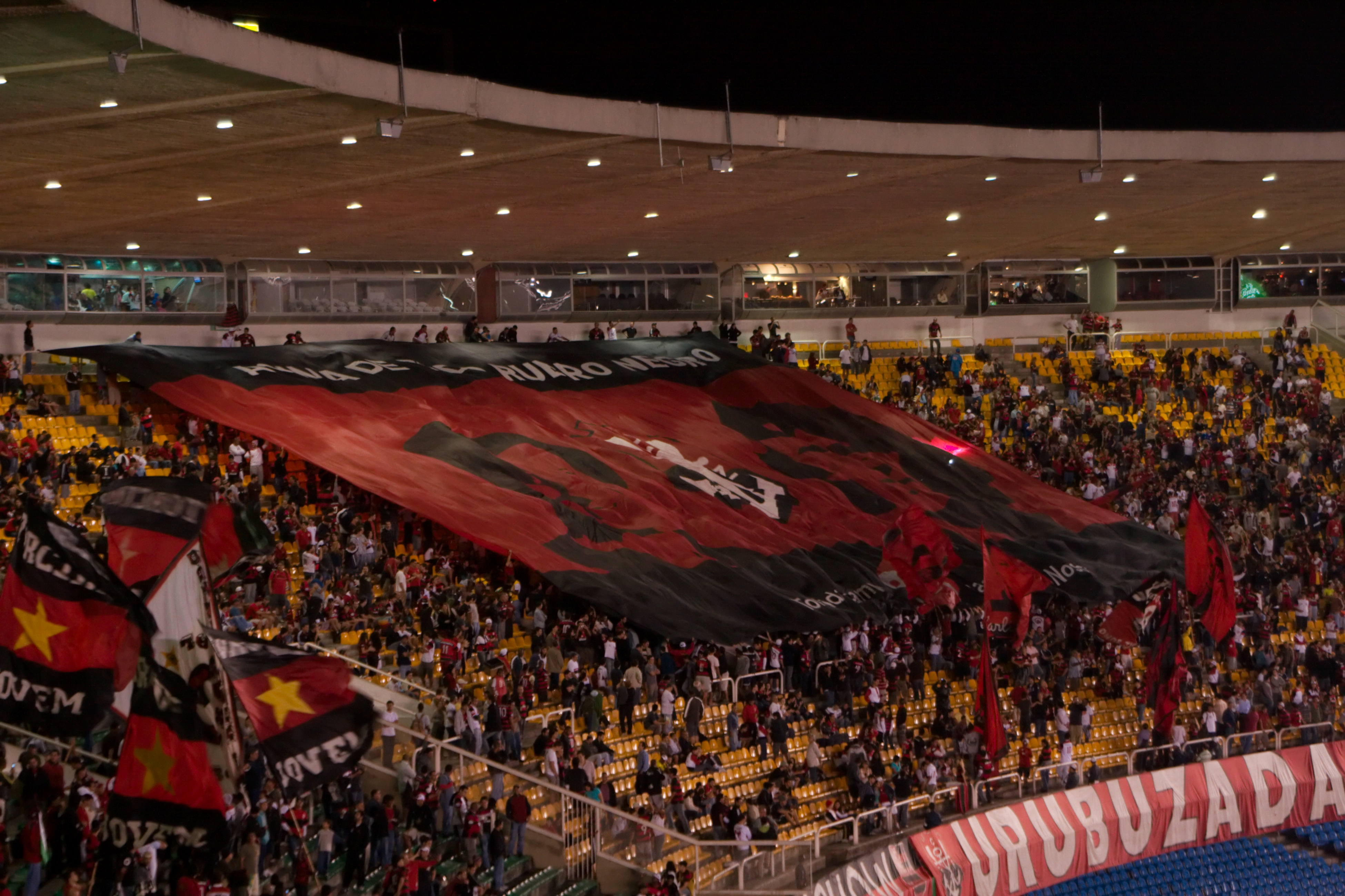 Photo des supporteurs du Clube de Regatas do Flamengo en 2009 lors d'un match contre le Palmeiras.